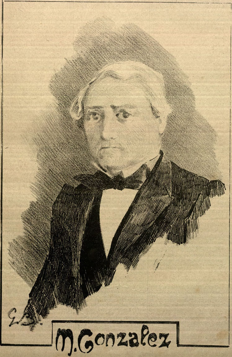 M. Gonzalez.